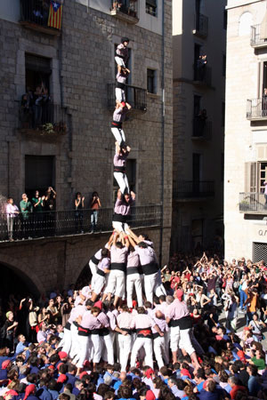 Pilar de 8 amb folre i manilles fet pels Minyons de Terrassa a les festes de sant Narcís a Girona l'any 2008